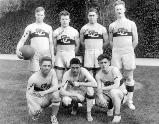 L'équipe de basket-ball de l'université de Santa Clara lors de la saison 1914-1915